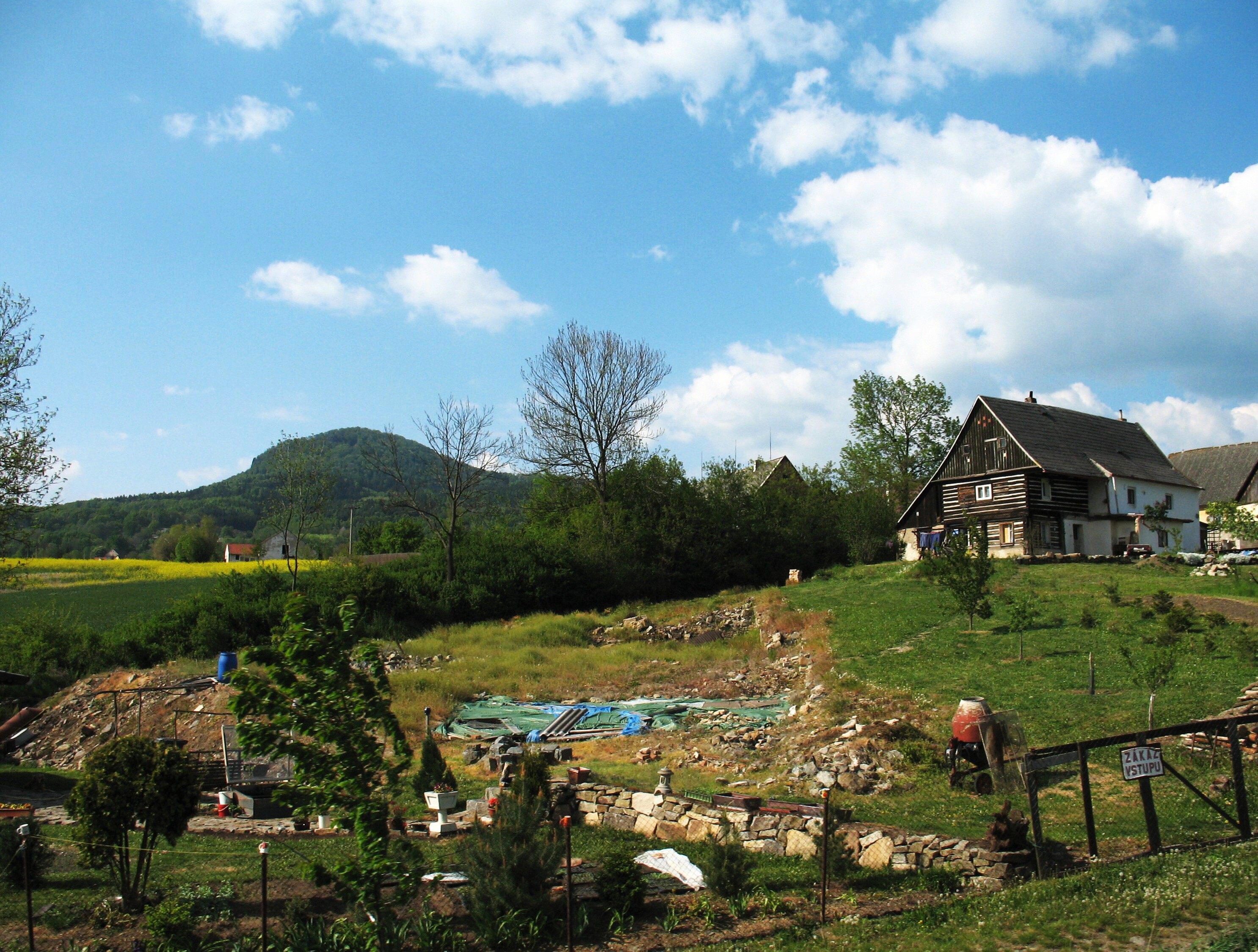 Dolní Chobolice u Úštěka s horou Sedlo v pozadí